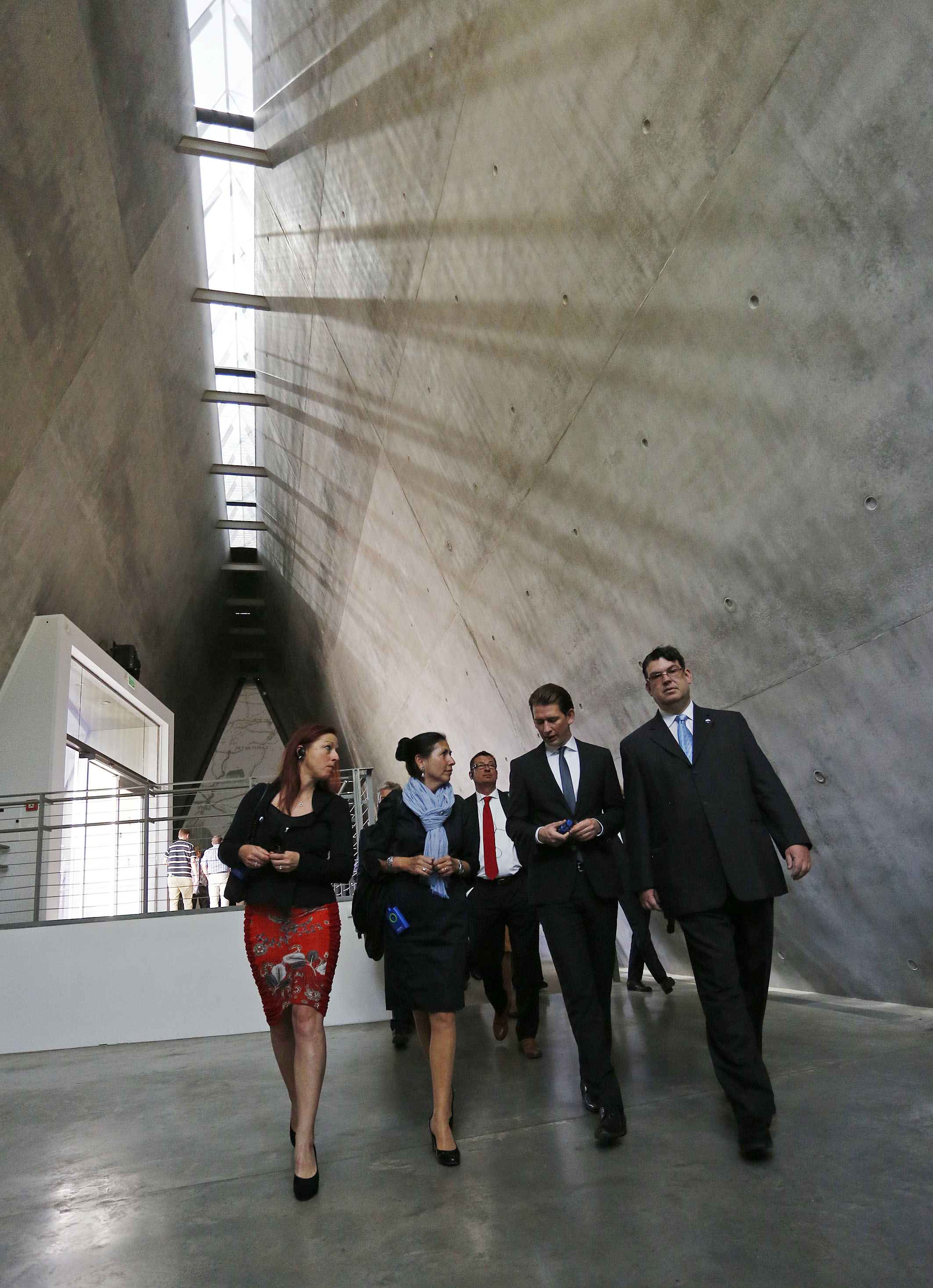 Arbeitsbesuch Israel. Außenminister Sebastian Kurz besucht Yad Vashem. Jerusalem. 22.04.2014, Foto: Dragan Tatic